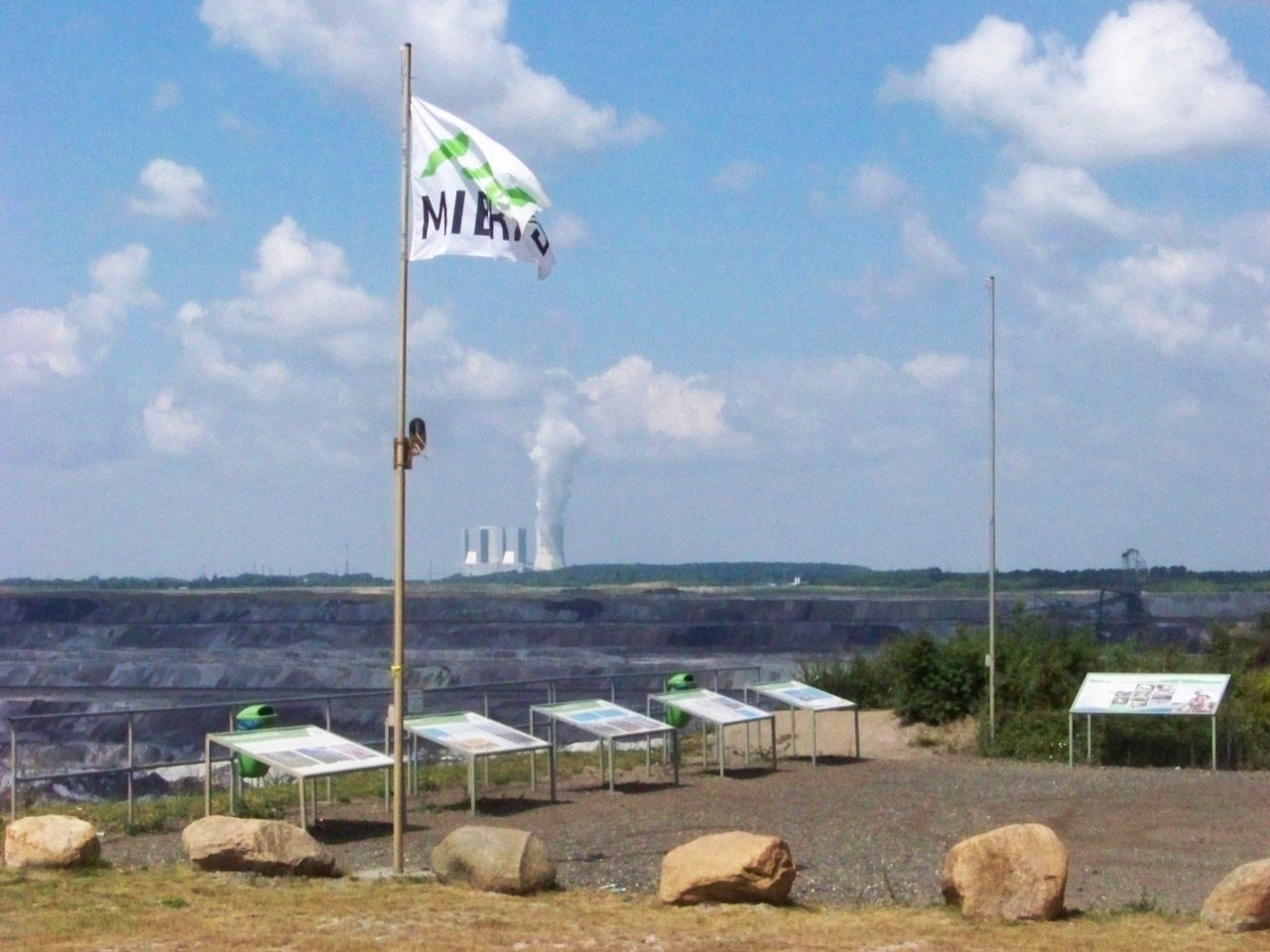 Tagebaublick in Deutzen